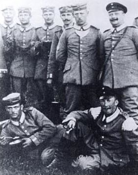 Friedrich Ludwig Scharf (stehend, zweiter von rechts) mit Mitgliedern des Großherzoglich-Mecklenburgischen Jäger-Bataillon 14, um 1914